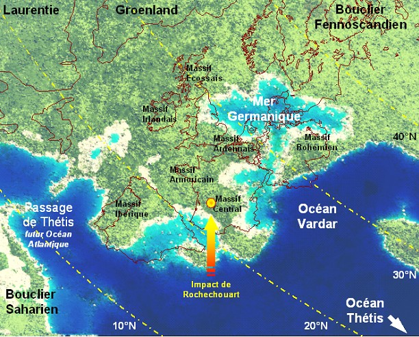 Vue en image de synthèse de l'Europe au Norien (il y a environ 220 millions d'années). Les contours des frontières actuelles sont approximatifs et ne servent qu'à se repérer. Hypothèses : Le niveau de l'océan Téthys a été relevé afin que la région lyonnaise soit tout juste inondée, puisque l'€™on trouve des dépôts sédimentaires ainsi que des animaux terrestres datés du Norien dans cette région. Les zones en beige sont des zones côtières très probablement inondées, mais relativement peu profondes, par exemple comme l'actuelle mer du Nord dont la profondeur est de l'€™ordre de 20 mètres. Réalisation personnelle de Frédéric. La carte de l'Europe au Norien été créée par l'€™auteur d'€™après une libre interprétation de la carte no 10 Carnien-Norien (env. 220 Ma), issue de Evolution of the arctic-north atlantic and the western Tethys - a visual presentation of a series of paleogeographic-paleotectonic mapsâ€, par Peter A. Ziegler.